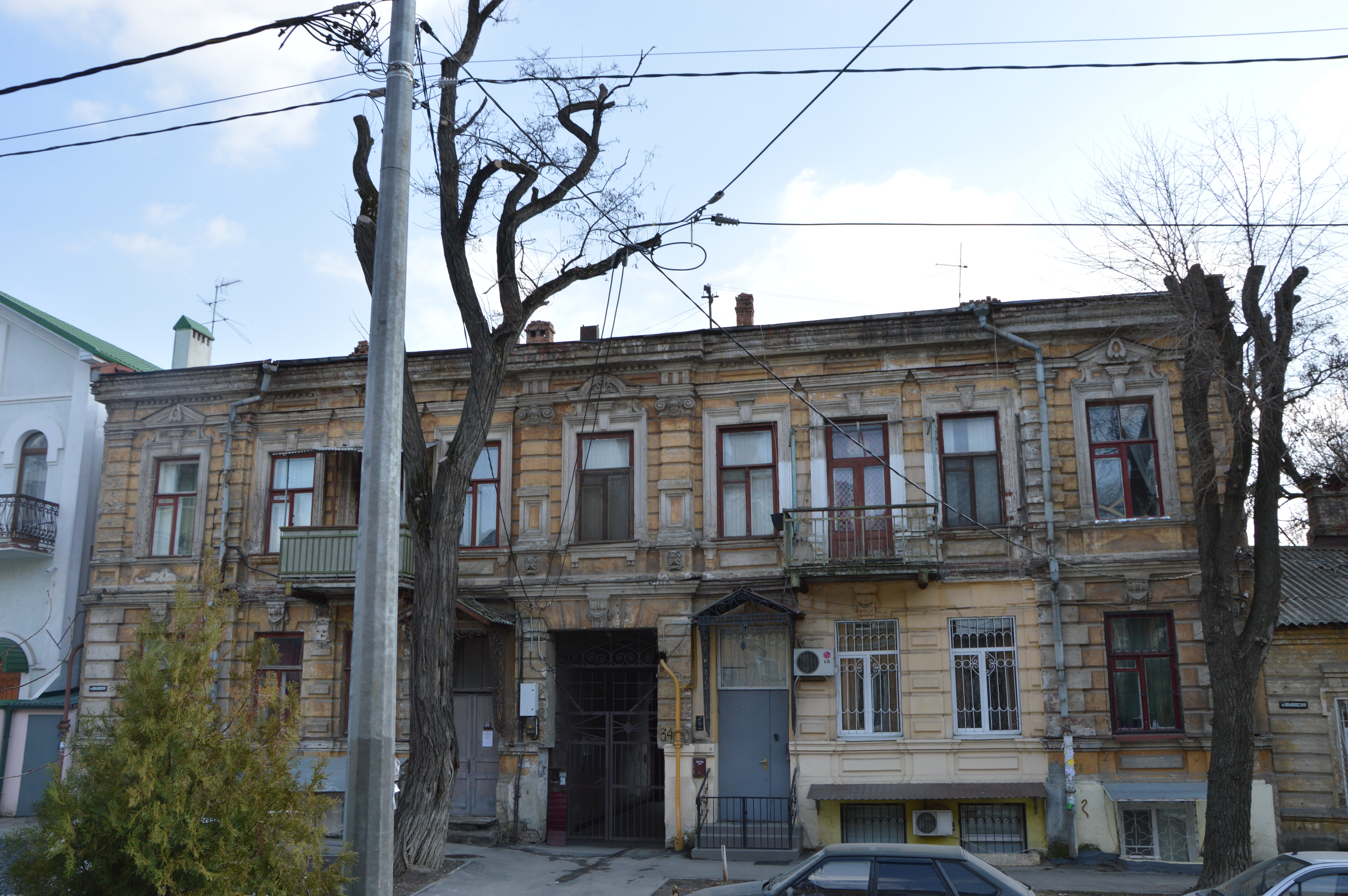 Здание города Ростова-на-Дону